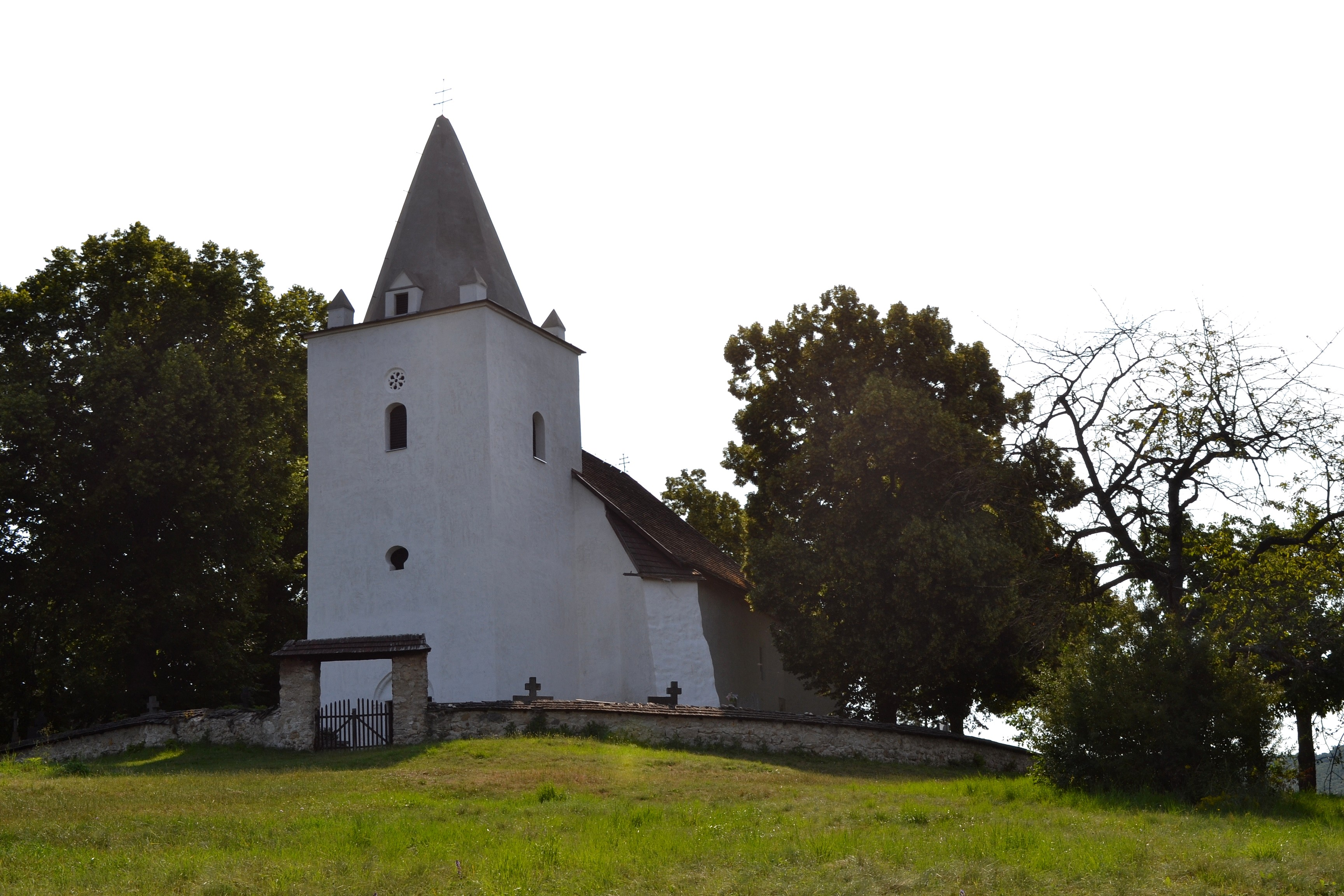 Klátova Nová Ves, Kostol Panny Márie Kráľovnej anjelov v miestnej časti Sádok; kostolík zaberá temeno nevysokého kopca Chríb južne od Sádku